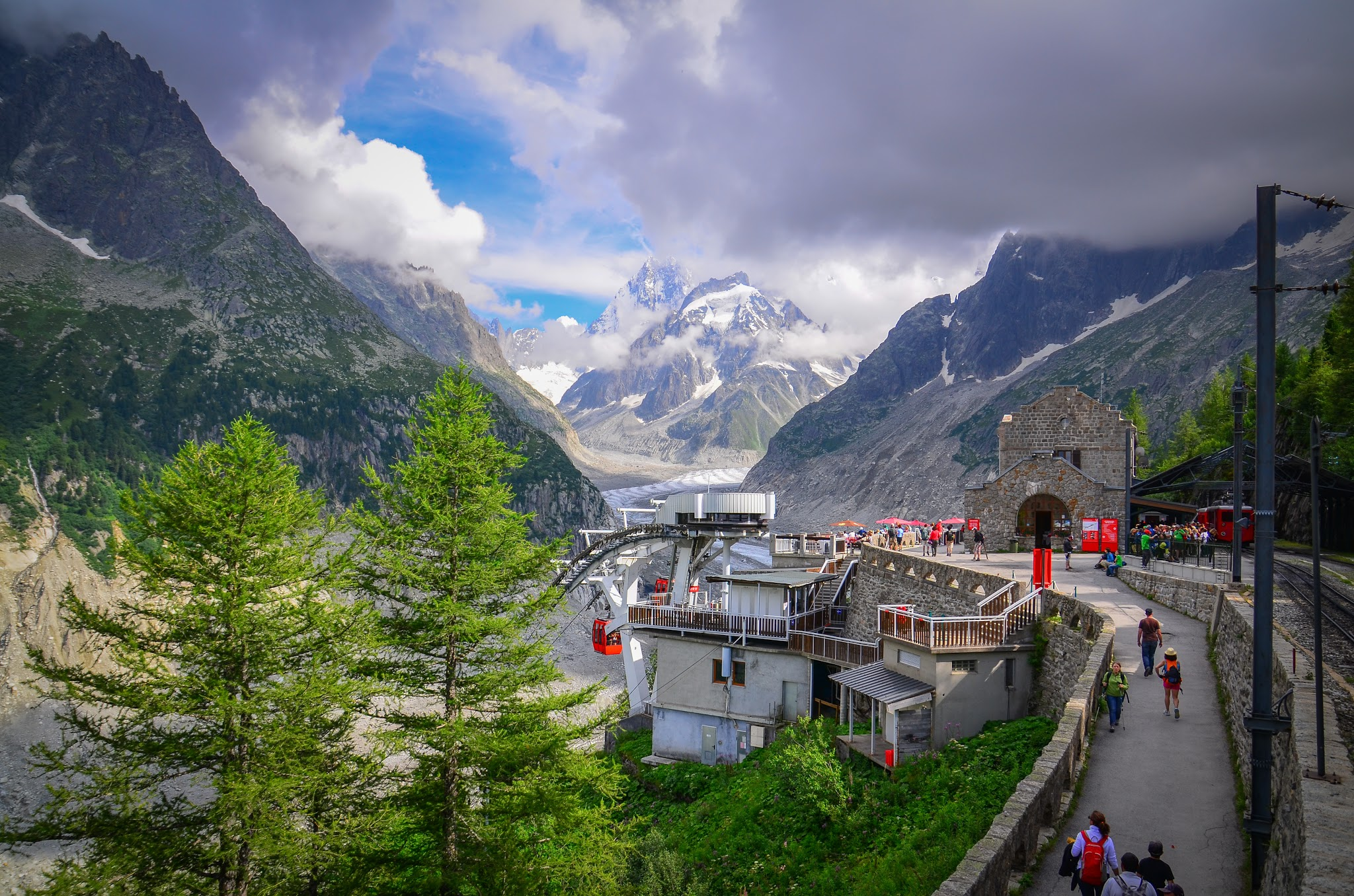 Station à l'arrivée du chemin de fer de Montenvers